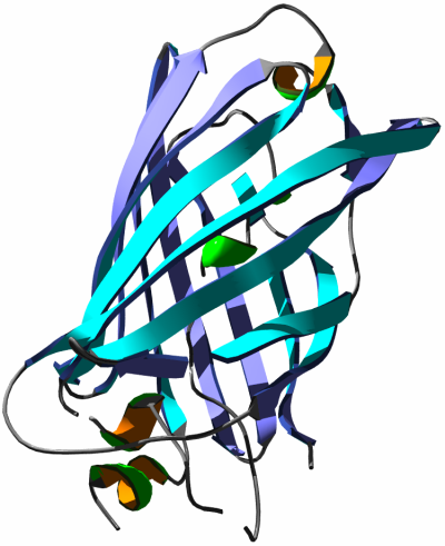 GFP - Green Fluorescent Protein